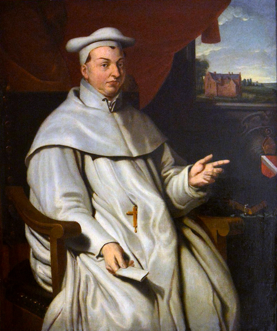 Abt van Malsen van de Abdij van Bernetitle QS:P1476,nl:"Abt van Malsen van de Abdij van Berne" label QS:Lnl,"Abt van Malsen van de Abdij van Berne"